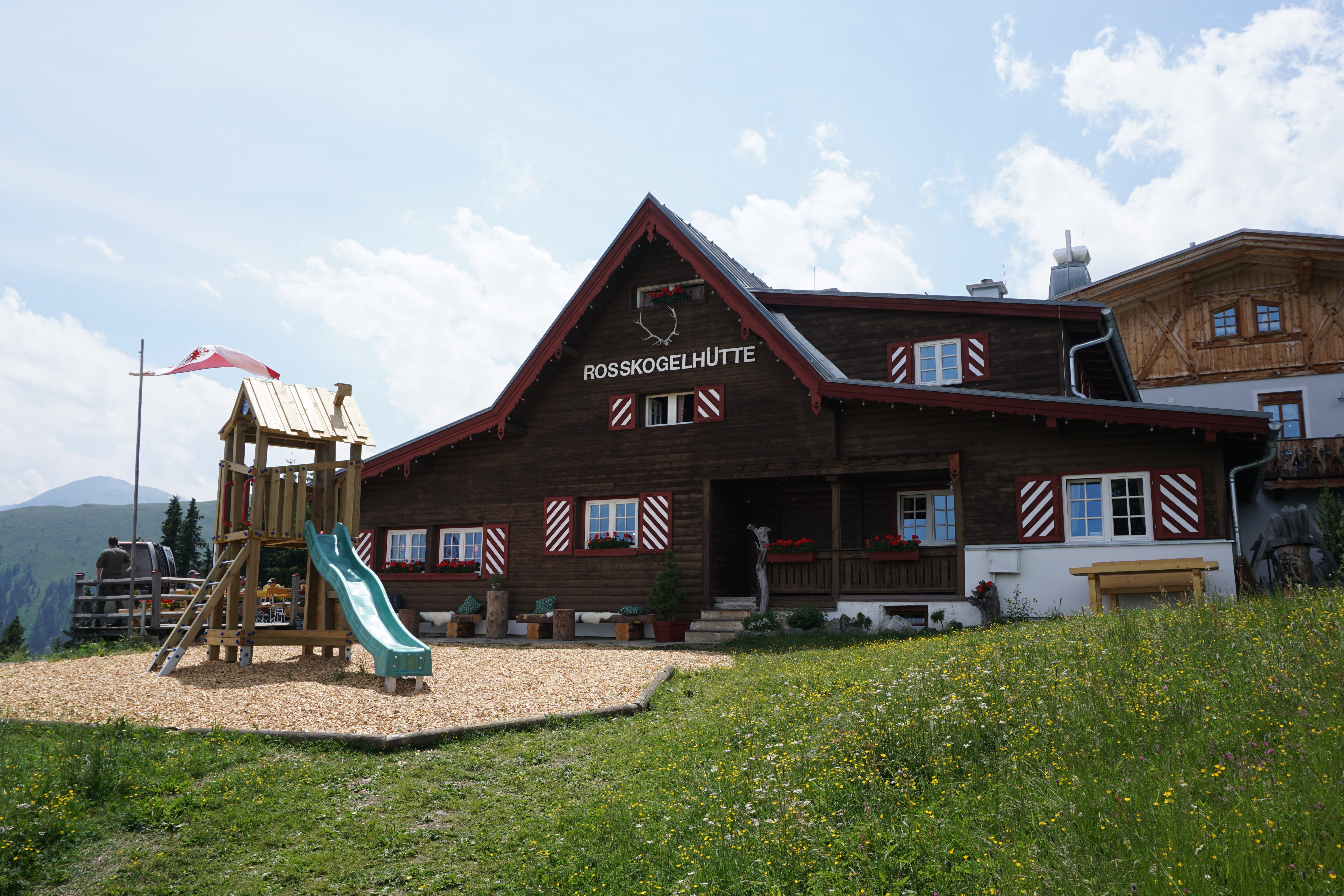 Roßkogelhütte